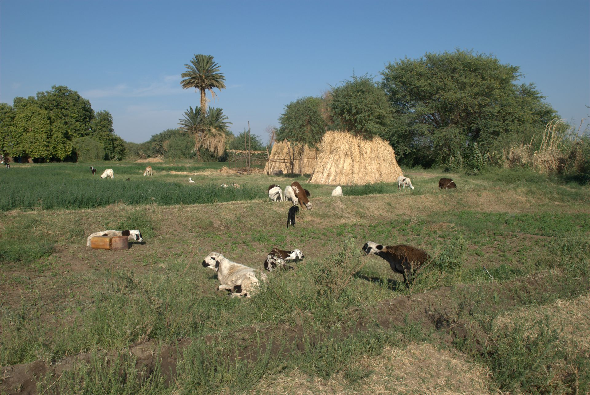 Dongola, Sudan, agriculture